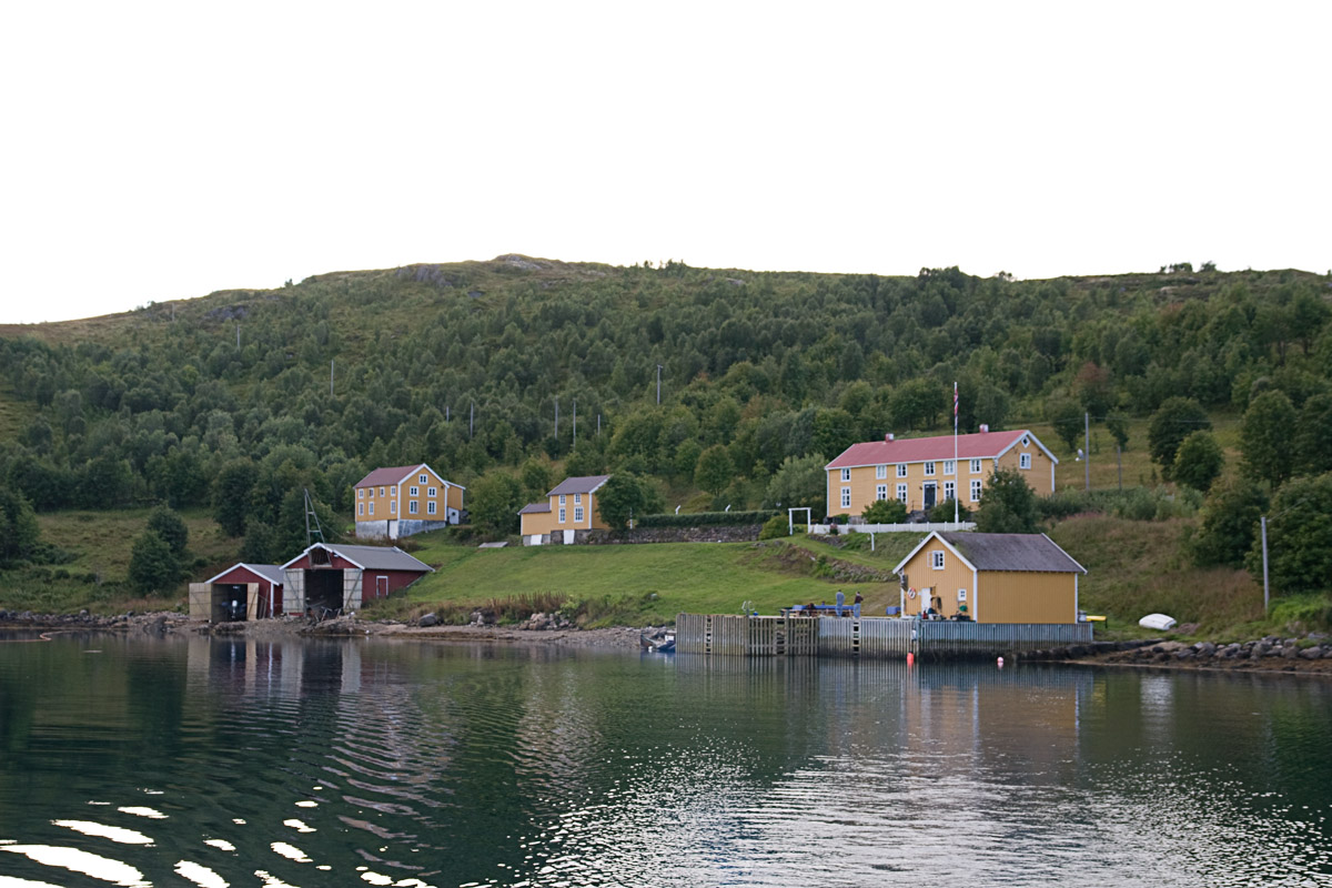 Finvåg